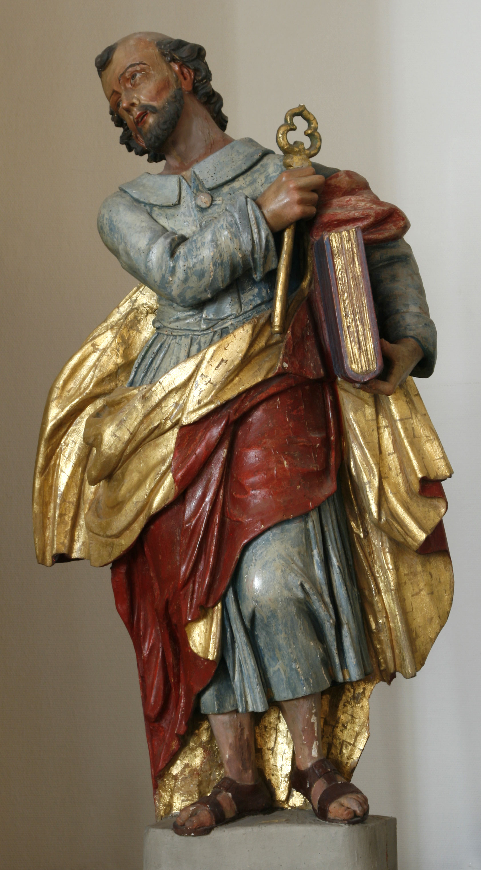 Hellege Péitrus-Statu an der Kierch Lëntgen.